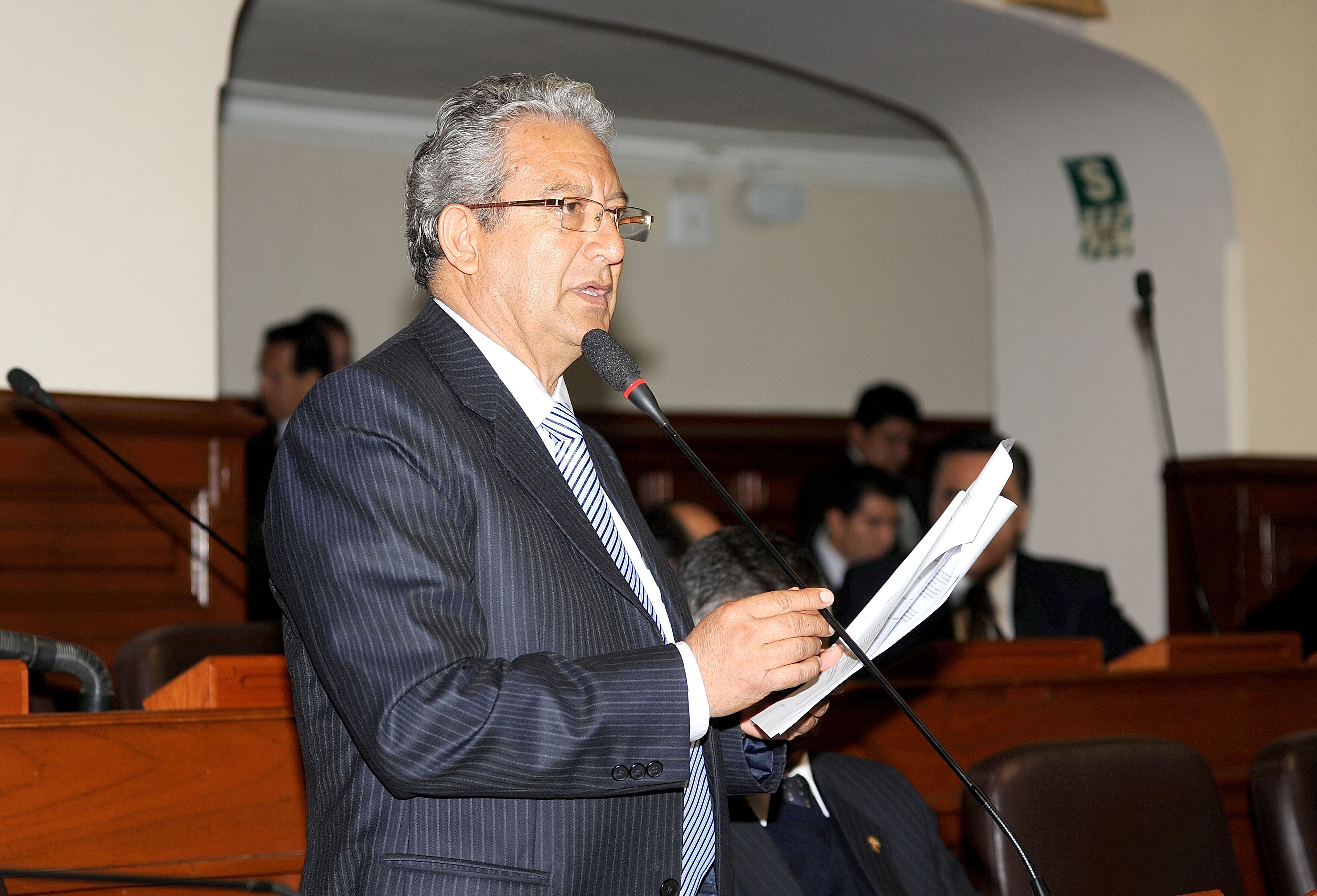 El legislador Alejandro Rebaza expresa su posición en el debate parlamentario realizado esta mañana por el Pleno congresal.